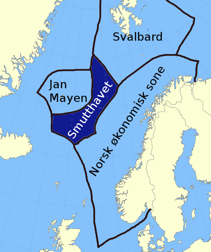 Smutthavet i Nordsjøen.